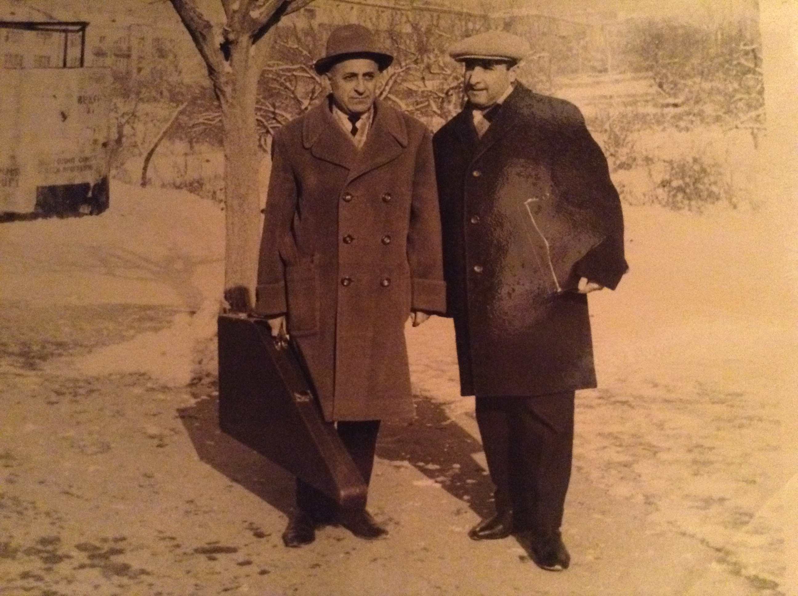 Զավեն Տերմենջյանը տաղանդավոր դուդուկահար Վաչե Հովսեփյանի հետ